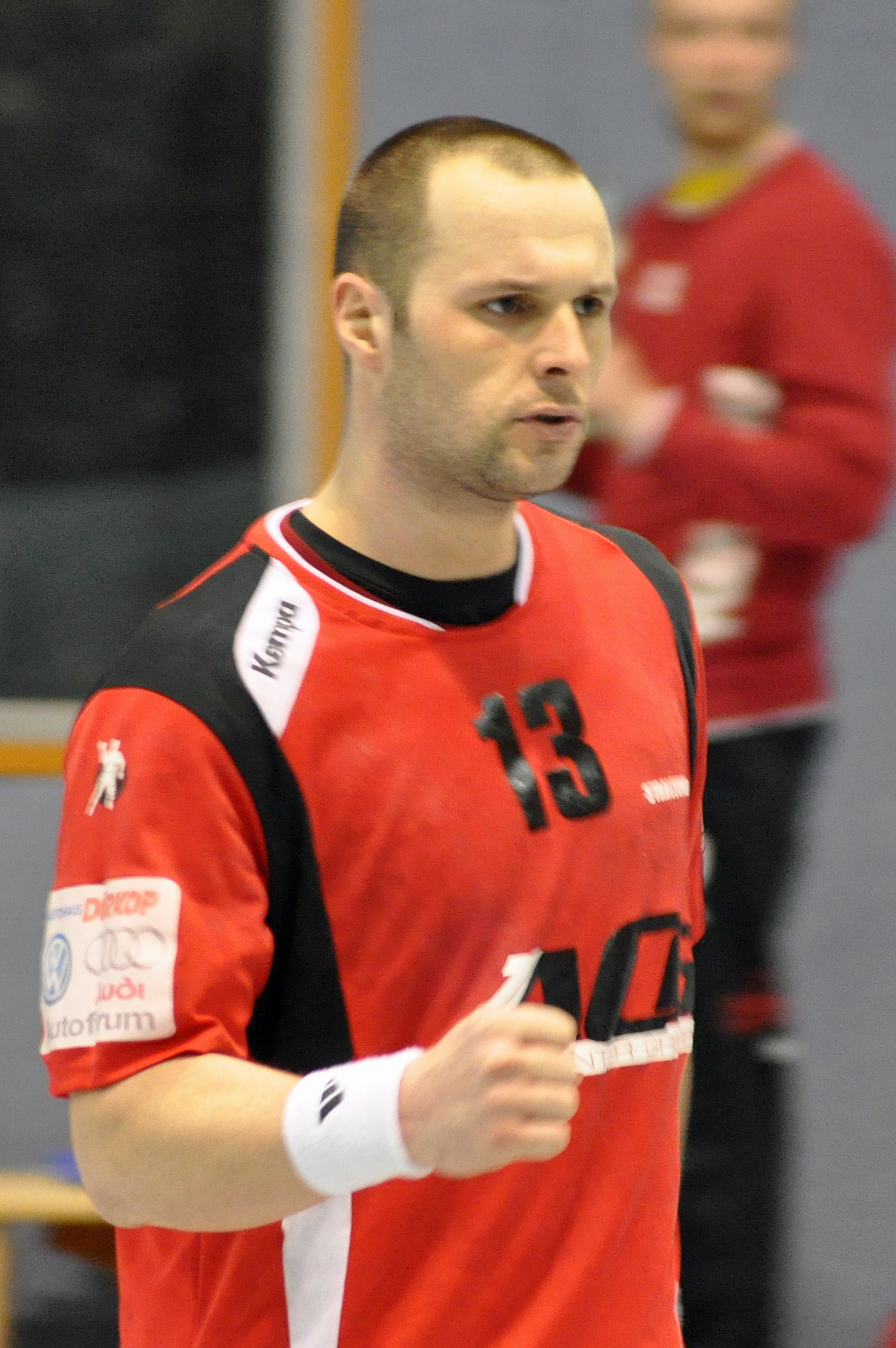 Bild aufgenommen beim Spiel in der 3. Liga (DHB) zwischen dem Stralsunder HV und dem HSV Insel Usedom am 23. März 2013 in der Stralsunder Vogelsanghalle. Das Speil endete 30:29 für den Stralsunder HV.